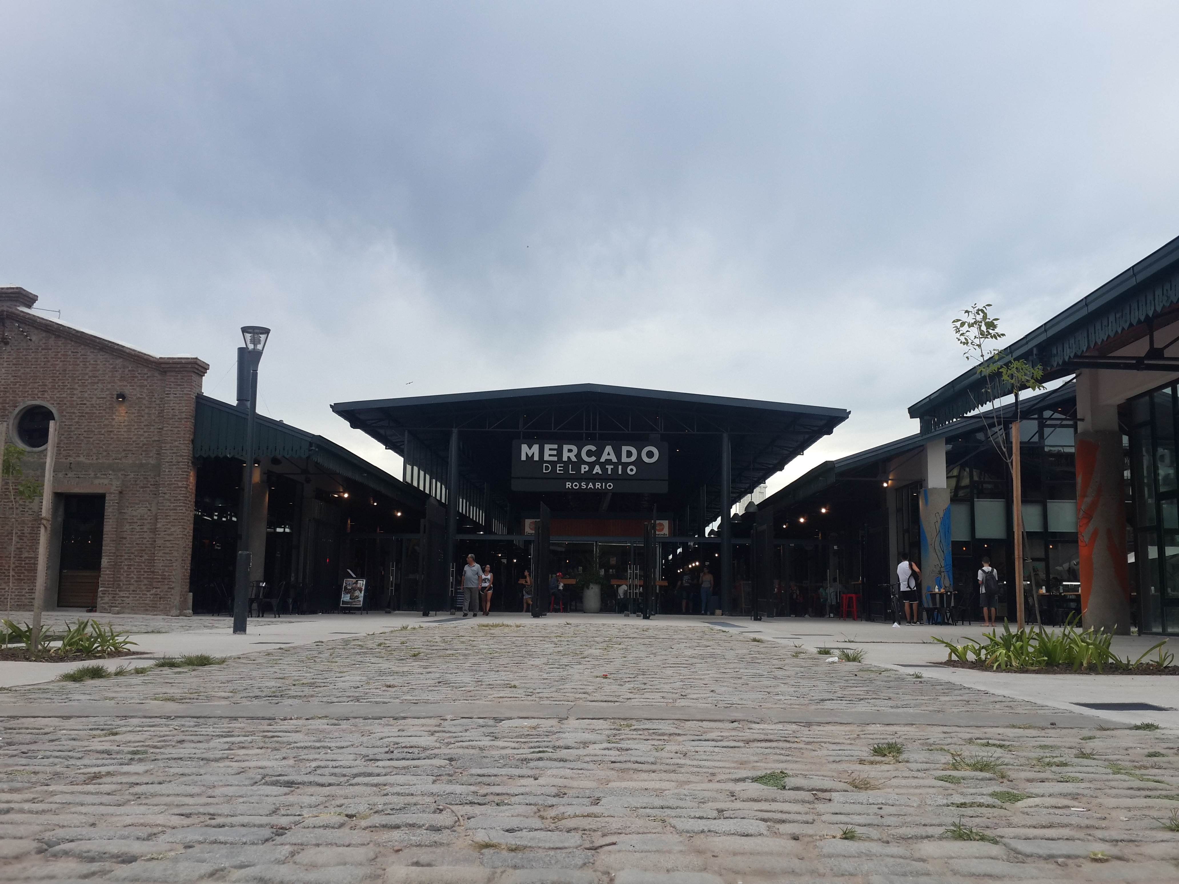 Esta es una de las entradas al famoso Mercado del Patio de la ciudad de Rosario, Argentina.